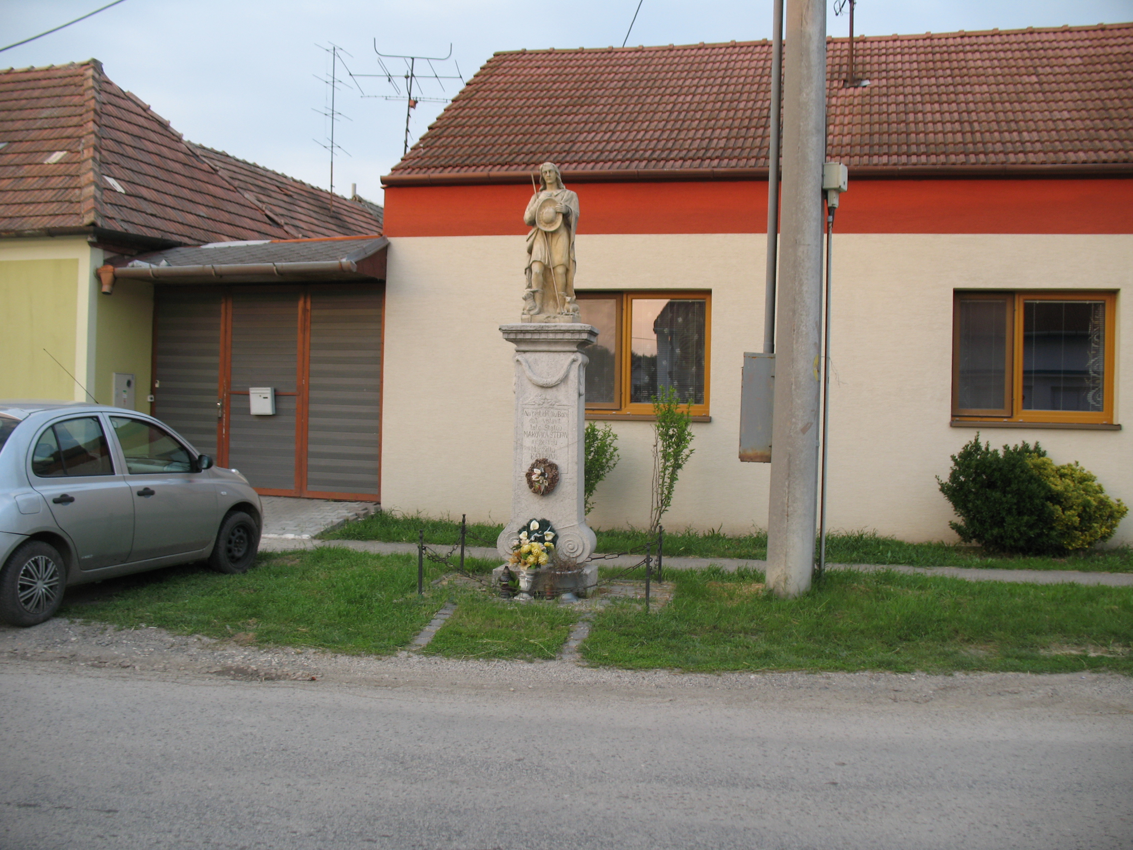 Bucsány